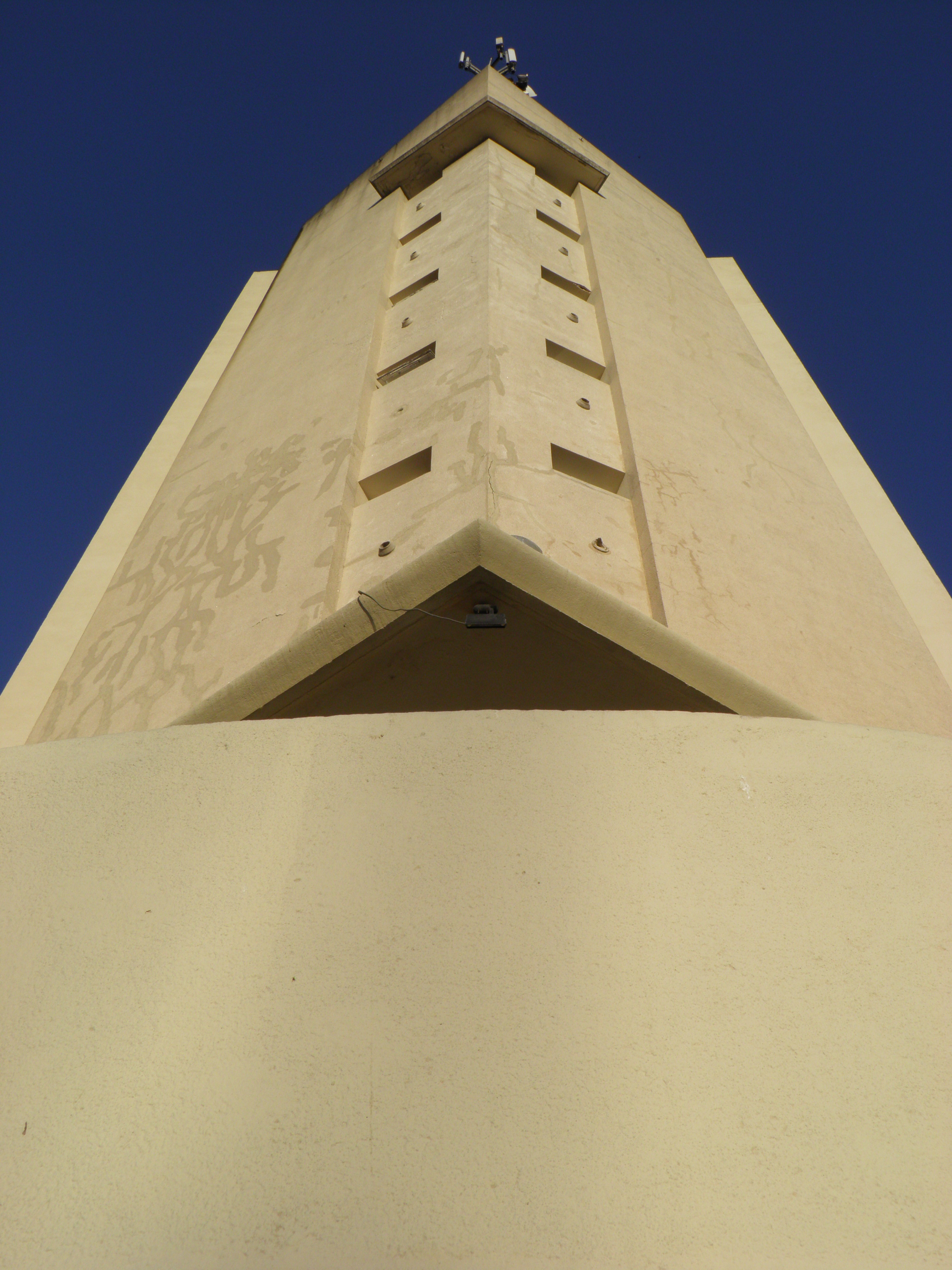 Entrada principal al edificio del Yacht Club.Puerto del Buceo. Ubicado en el departamento de Montevideo